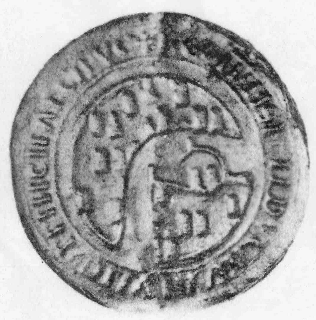 Die Meerenge von Messina 1246 auf Bulle Kaiser Friedrichs II. an BF. 3584